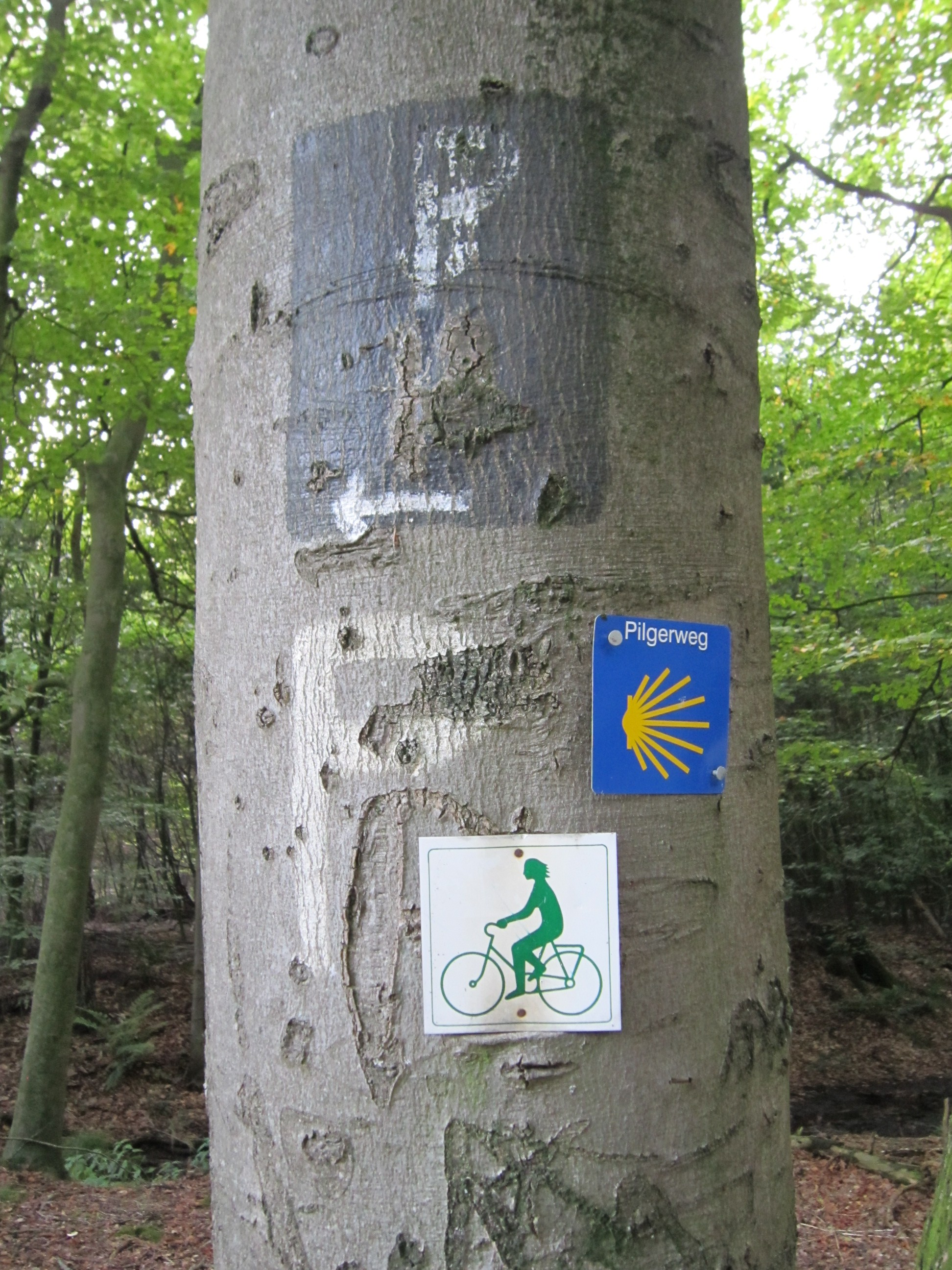 Markierungen ("P"-Zeichen und Jakobsmuschel) am Pickerweg im Welper Wald bei Vechta